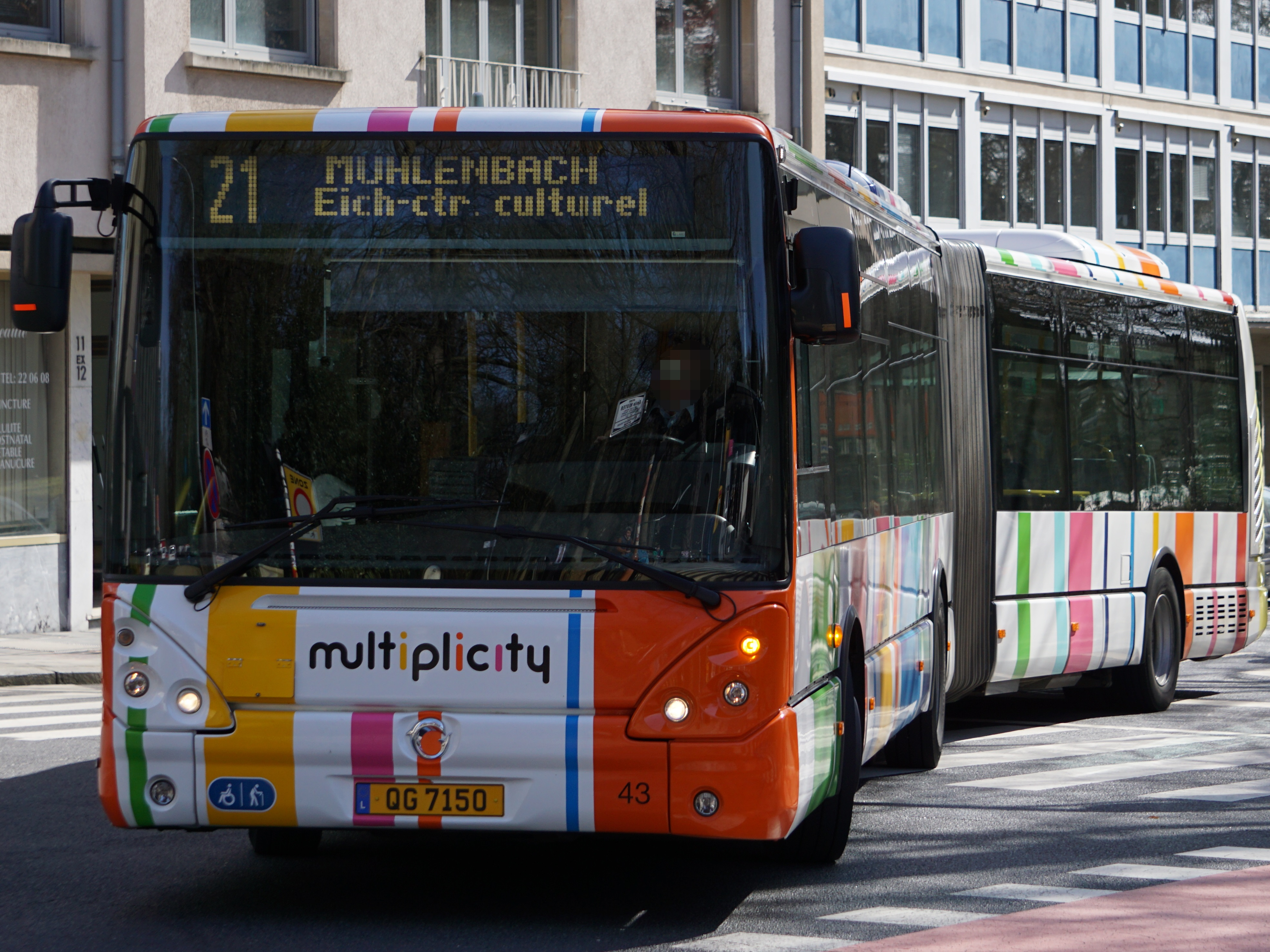 Bus AVL (Autobus de la Ville de Luxembourg) #43 (QG 7150) Marque: Irisbus Fiert vum Bd du Prince Henri an d'Av. Emile Reuter op der Linn 21 a Richtung Rollengegronn.